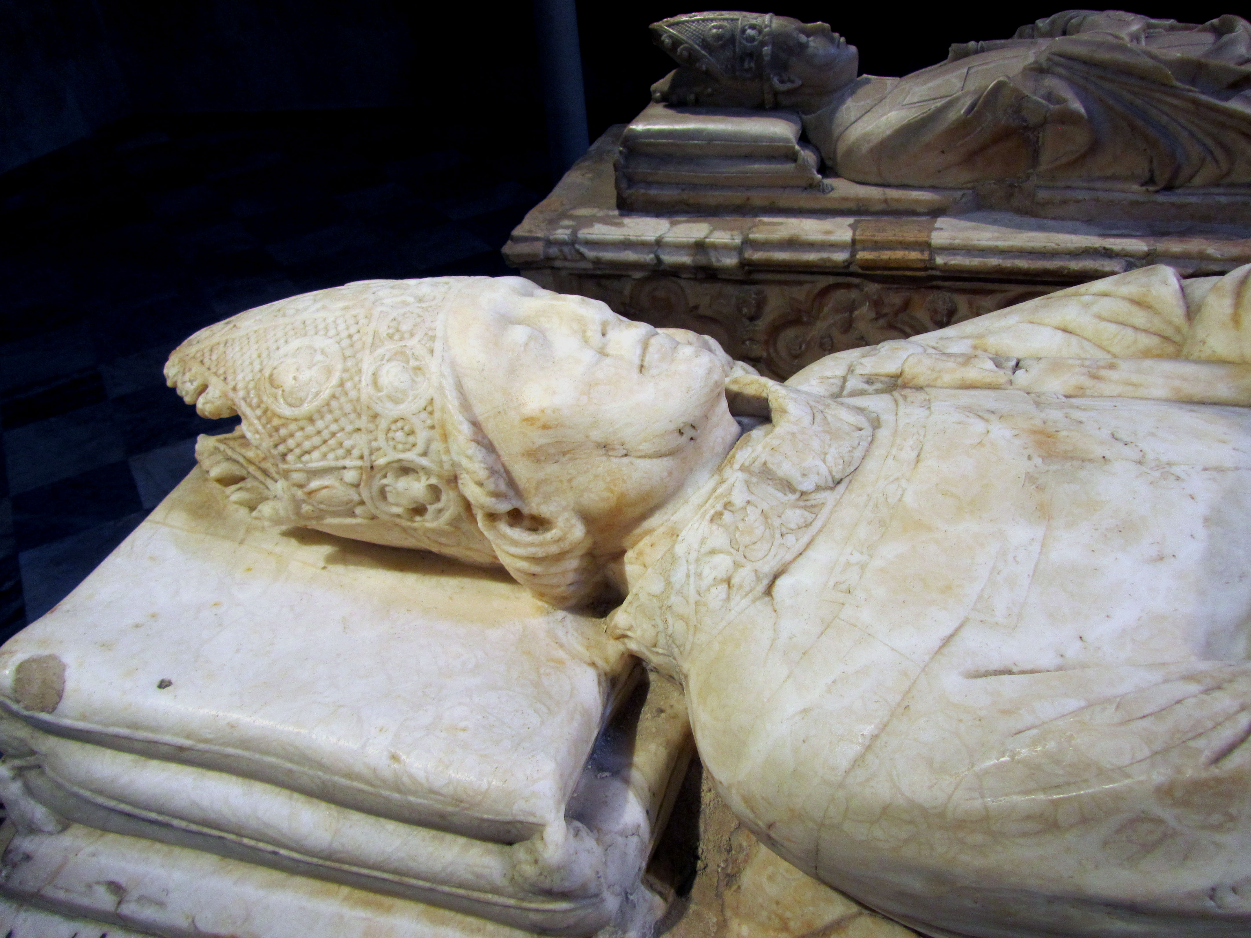 Detalle del sepulcro del arzobispo Pedro Tenorio en la capilla de San Blas de la catedral de Toledo (Spain)